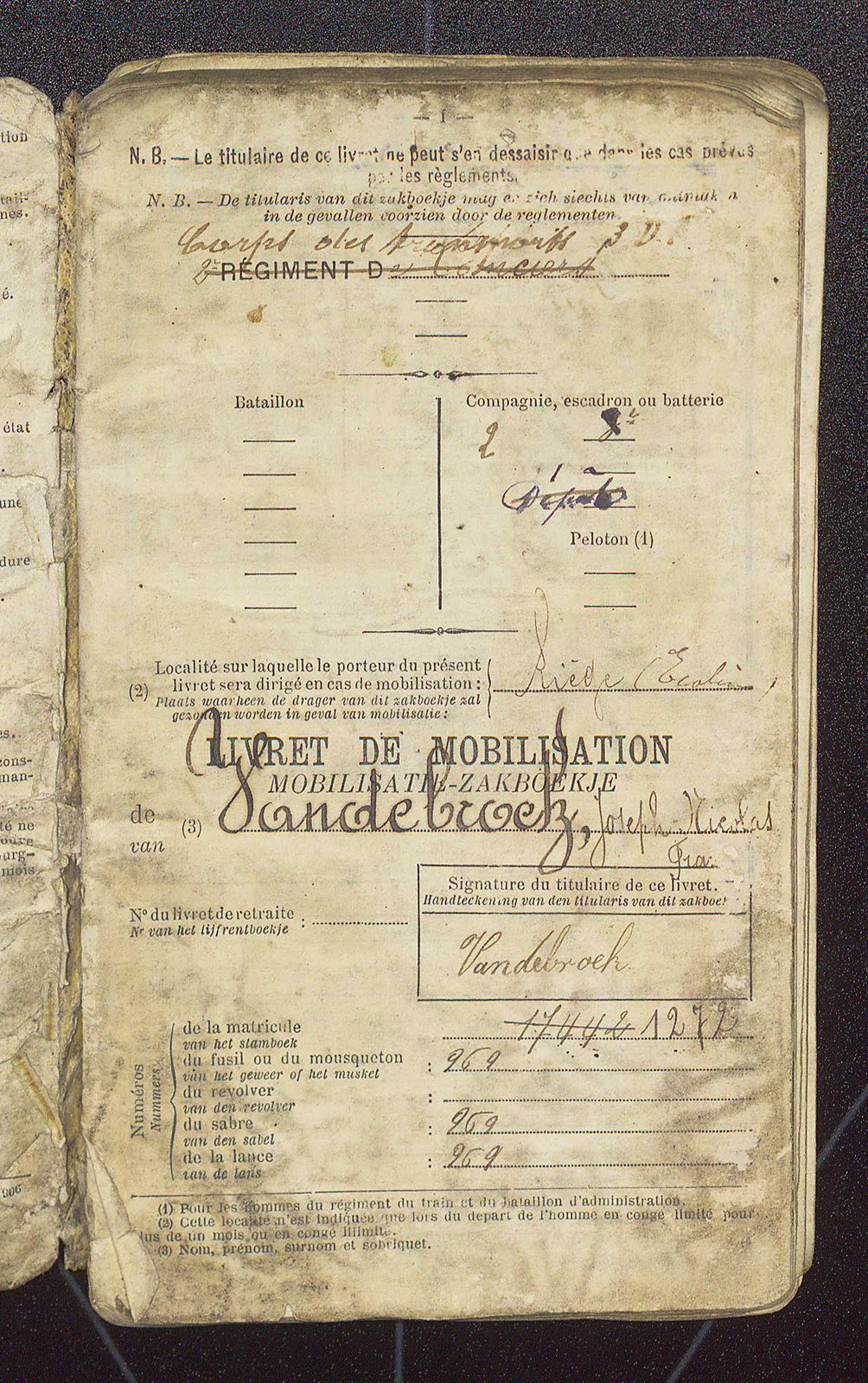 Jospeph-Nicolas-François Vandebroek, de peter van Gisèle Bresseau, heeft in 1908 zijn legerdienst gedaan en in 1914 is hij gemobiliseerd wegens de oorlog. Hij was een lancier (kan afgeleid worden aan het uniform op de foto en aan het opschrift op de eerste pagina), daarna “corps des transports”.